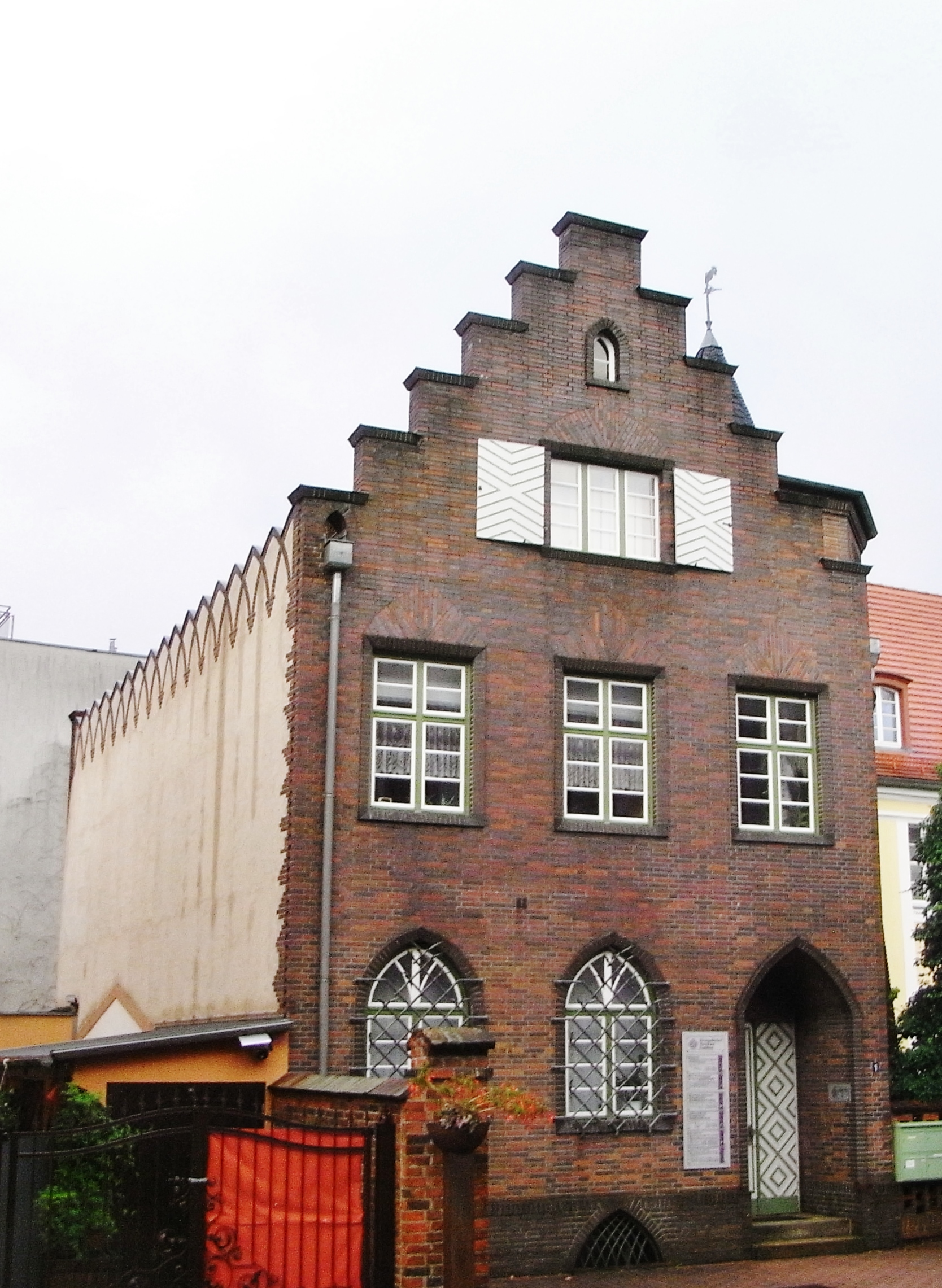 Nordwestansicht des Pfarrhauses in der Gertraudtenstraße 1, Cottbus, Land Brandenburg. An der Nordseite ist der Spitzbogenfries zu erkennen.